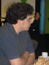 (Original text: Eric Lobron)